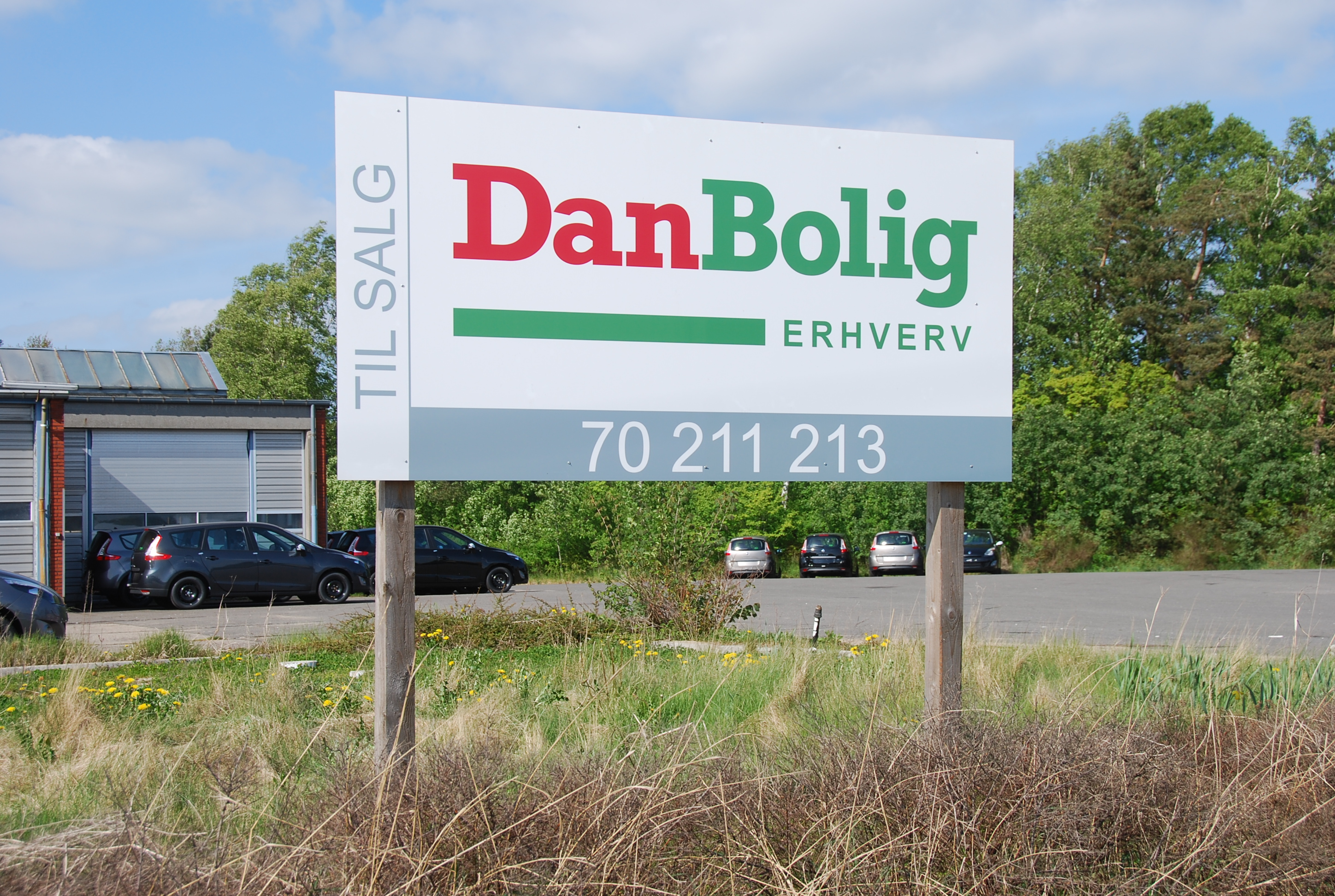 Skilt fra DanBolig, placeret på Holstebrovej i Viborg.